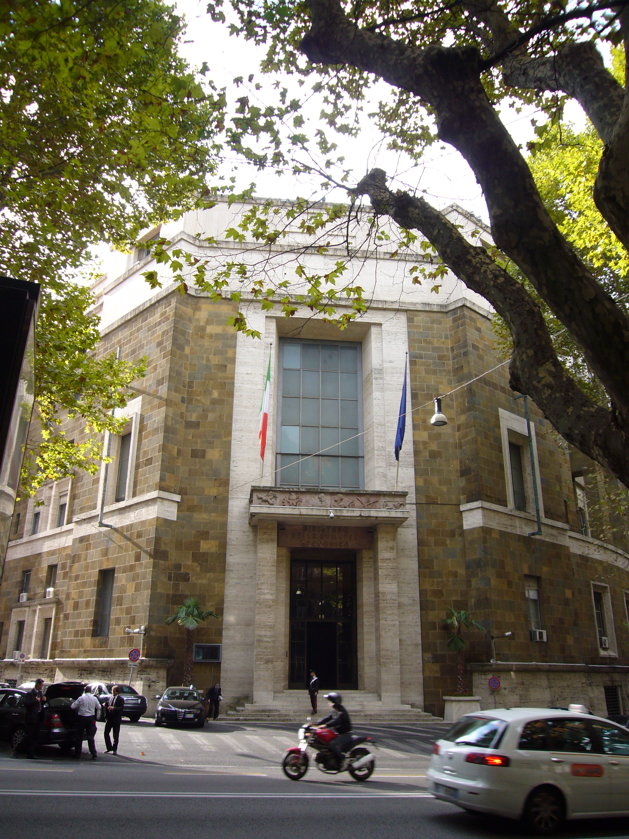 Roma, via Veneto. ex Ministero delle Corporazioni, attualmente (2014) dello Sviluppo economico (Piacentini e Vaccaro, 1932).